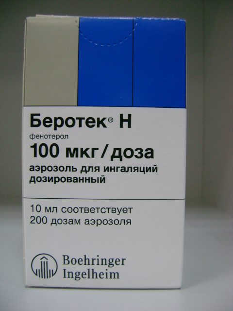 упаковка аэрозоля для ингаляций Беротек